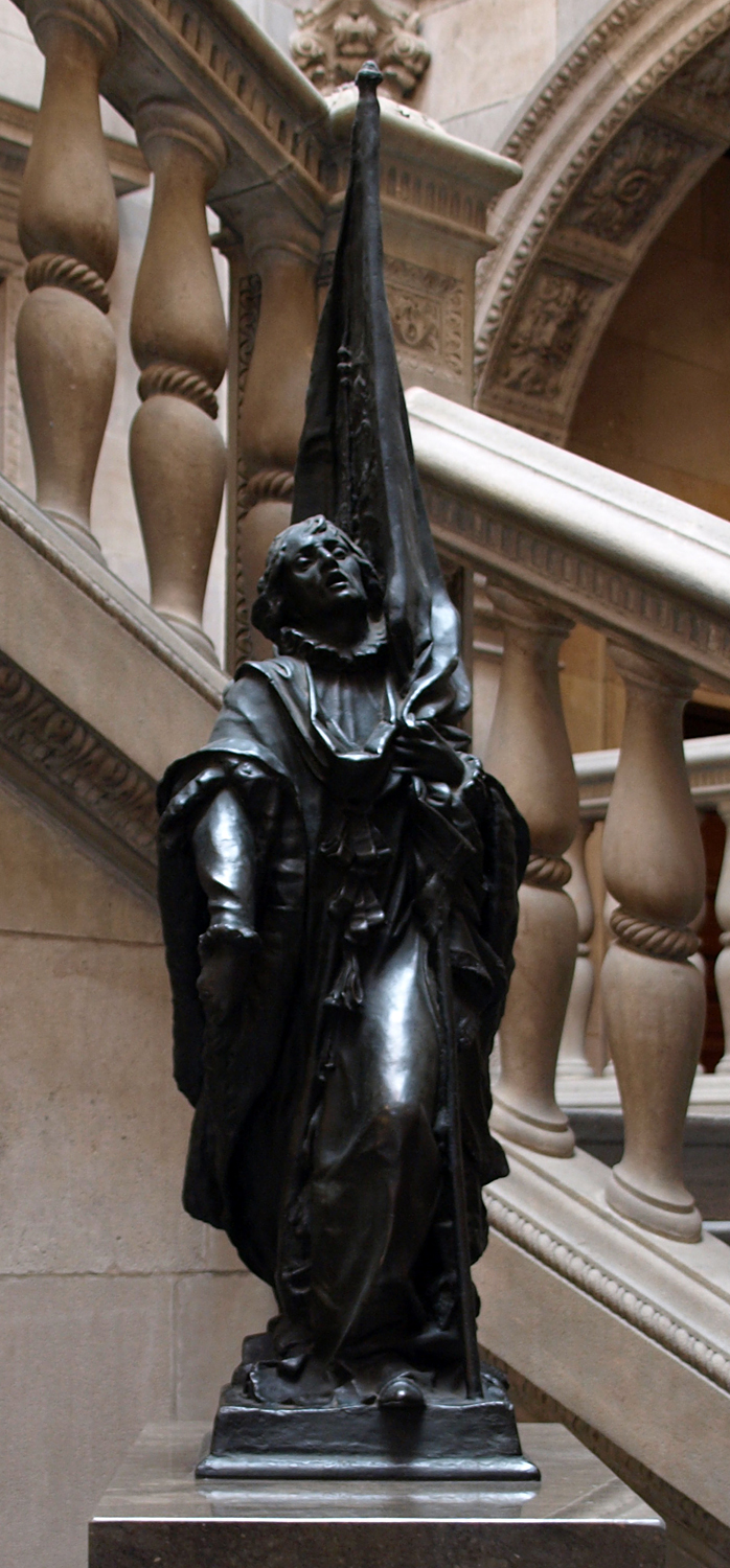 Rafael Casanova (Rossend Nobas, 1977~) - copia reducida